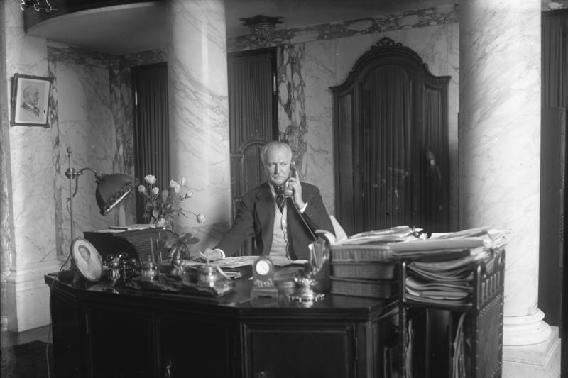 Luis Adlon, der Besitzer des berühmten Hotels "Adlon" in Berlin, hat jetzt die Leitung seines Unternehmens selbst übernommen ! U.B. zeigt den berühmten Hotelier Luis Adlon, in seinem Arbeitszimmer.